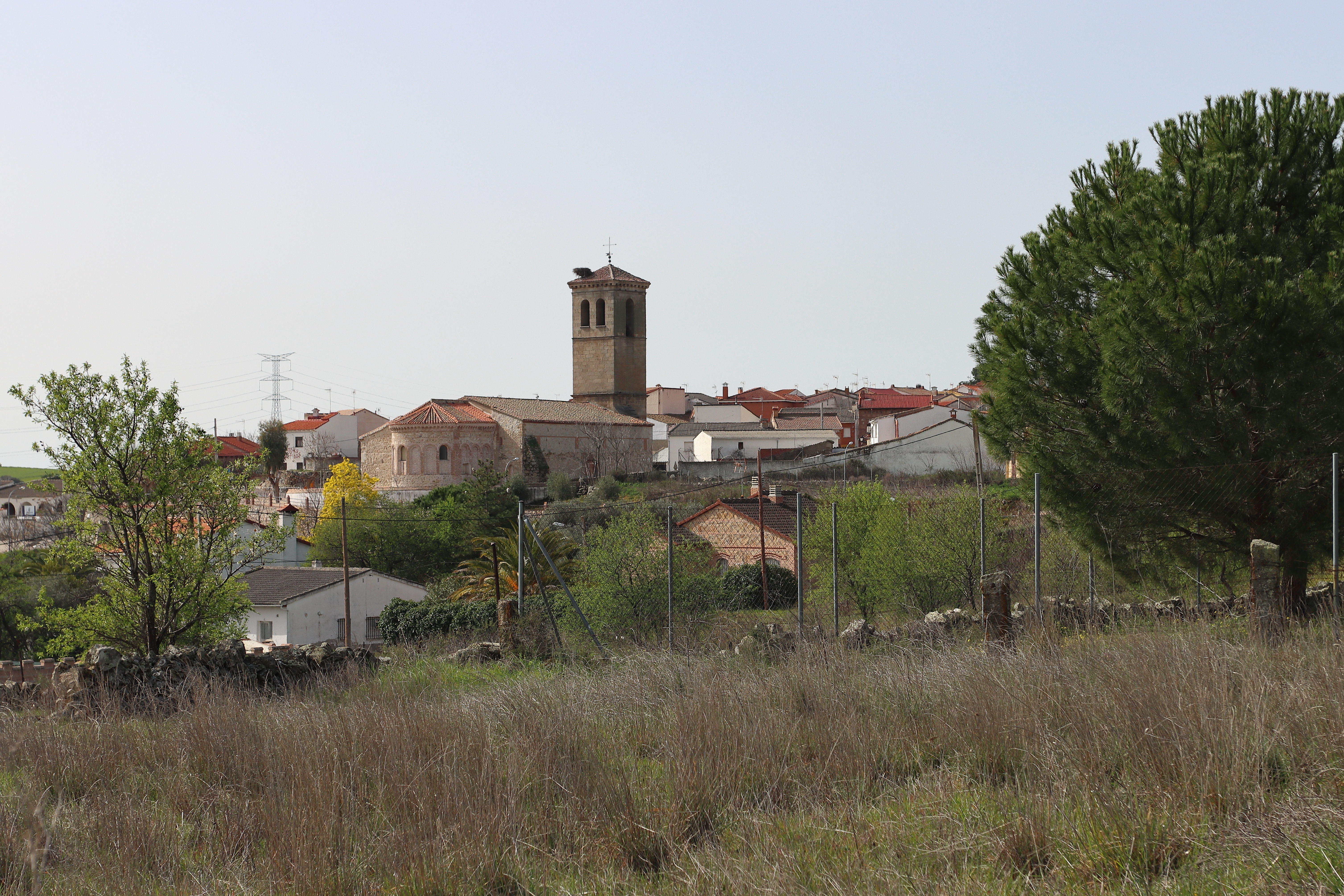 Paredes de Escalona, vista población desde TO-1455, 02